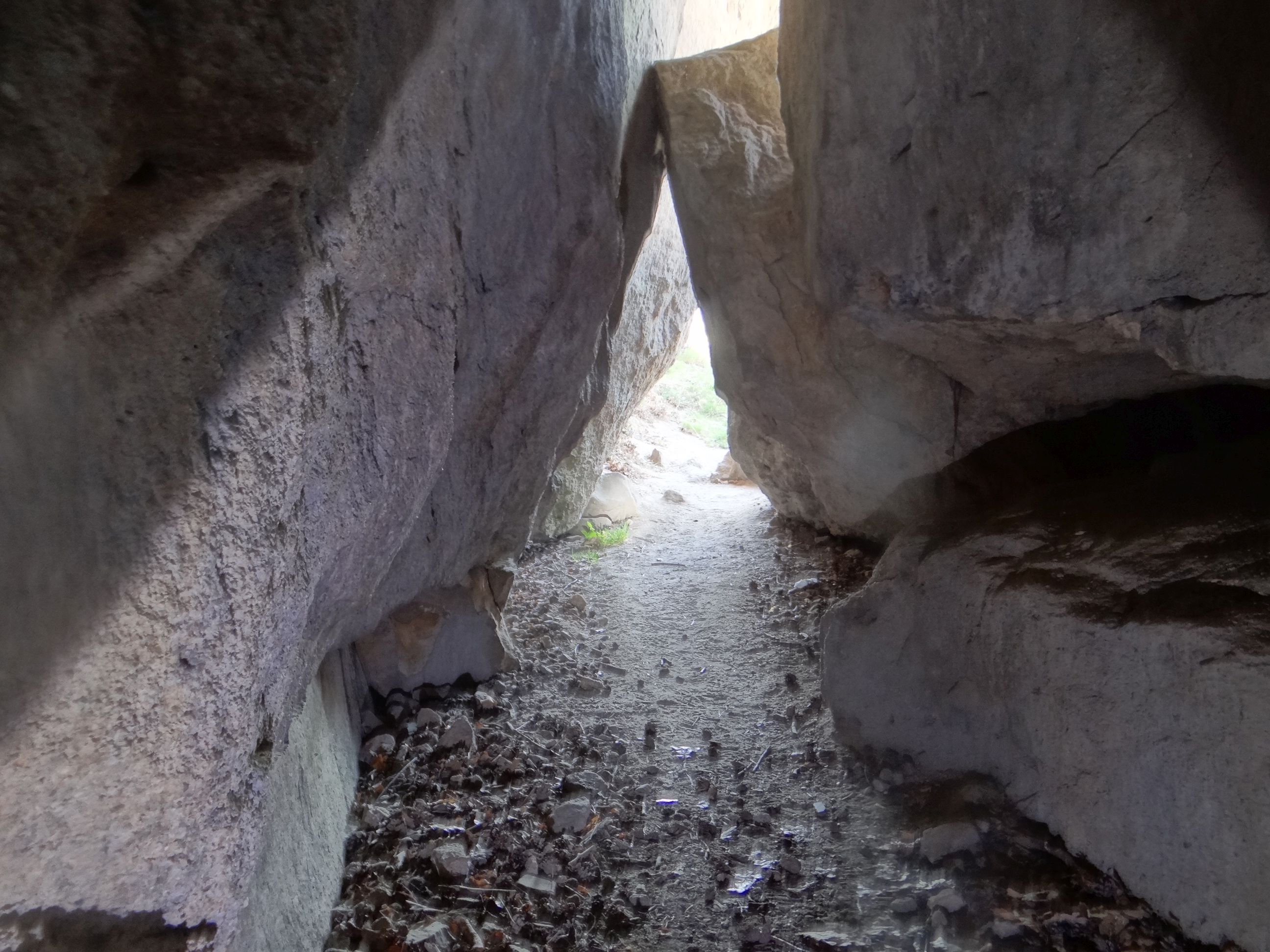 Jaskinia w Grunwaldzkiej Skale